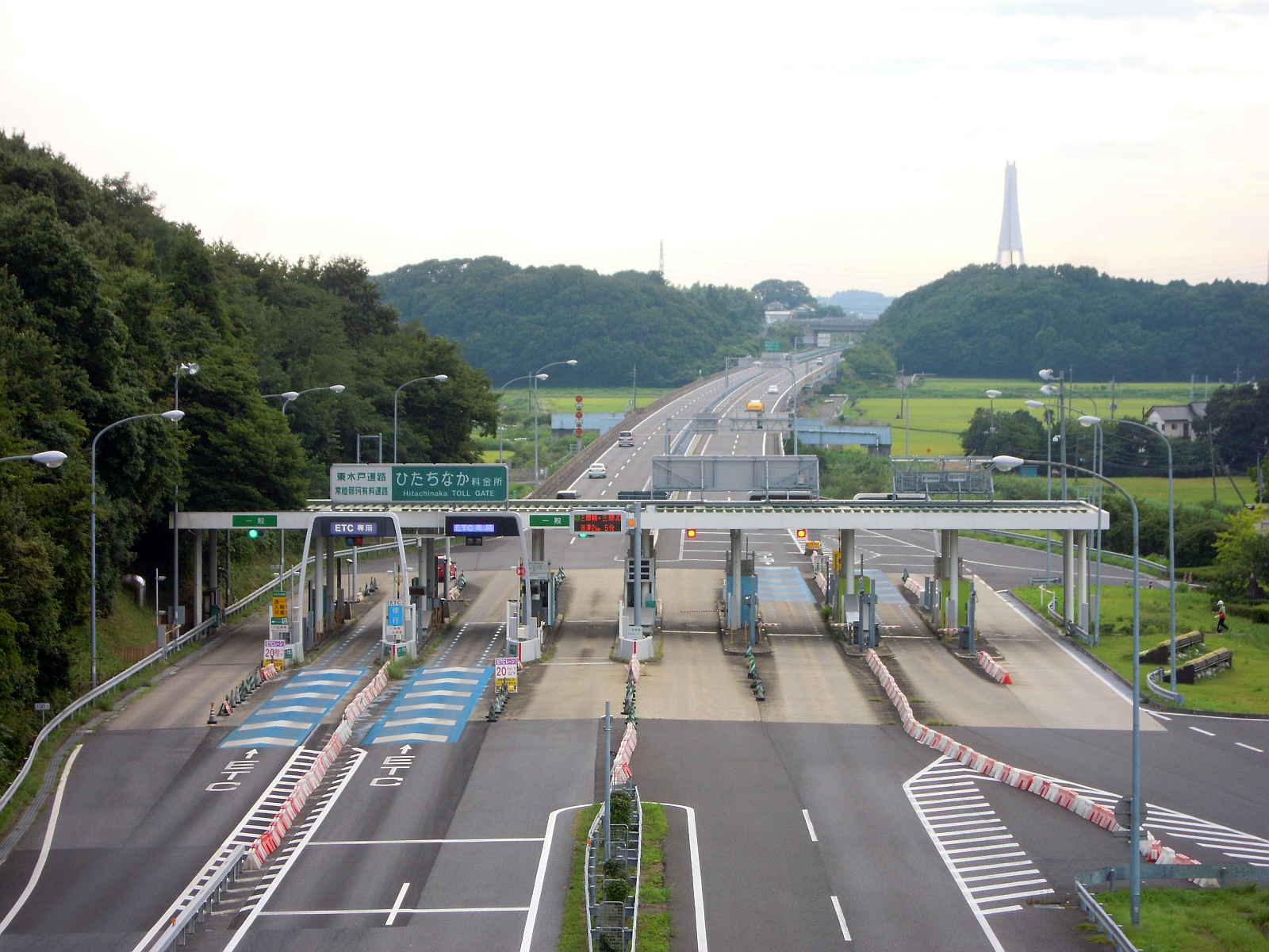 茨城県ひたちなか市にある東水戸道路と常陸那珂有料道路のひたちなかインターチェンジ料金所。常陸那珂有料道路ひたち海浜公園インターチェンジ方向から東水戸道路水戸大洗インターチェンジ方向に向けて、ひたちなか市道の鷹ノ巣跨道橋から撮影。上下線とも中央分離帯側が常陸那珂有料道路と接続するレーン。外側がひたちなかインターチェンジで乗り降りするレーン。